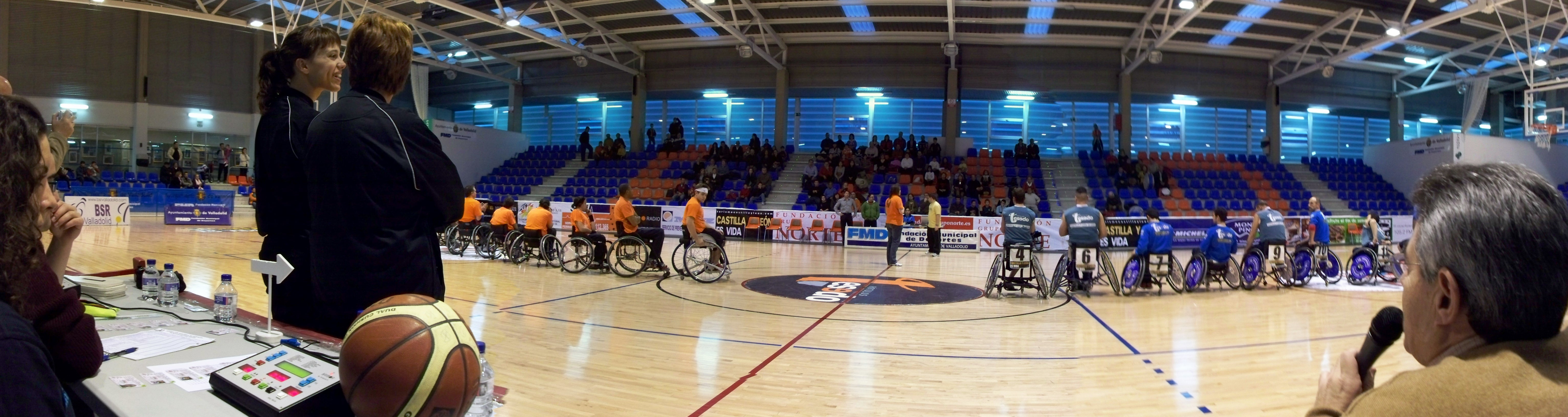 Presentacion del partido